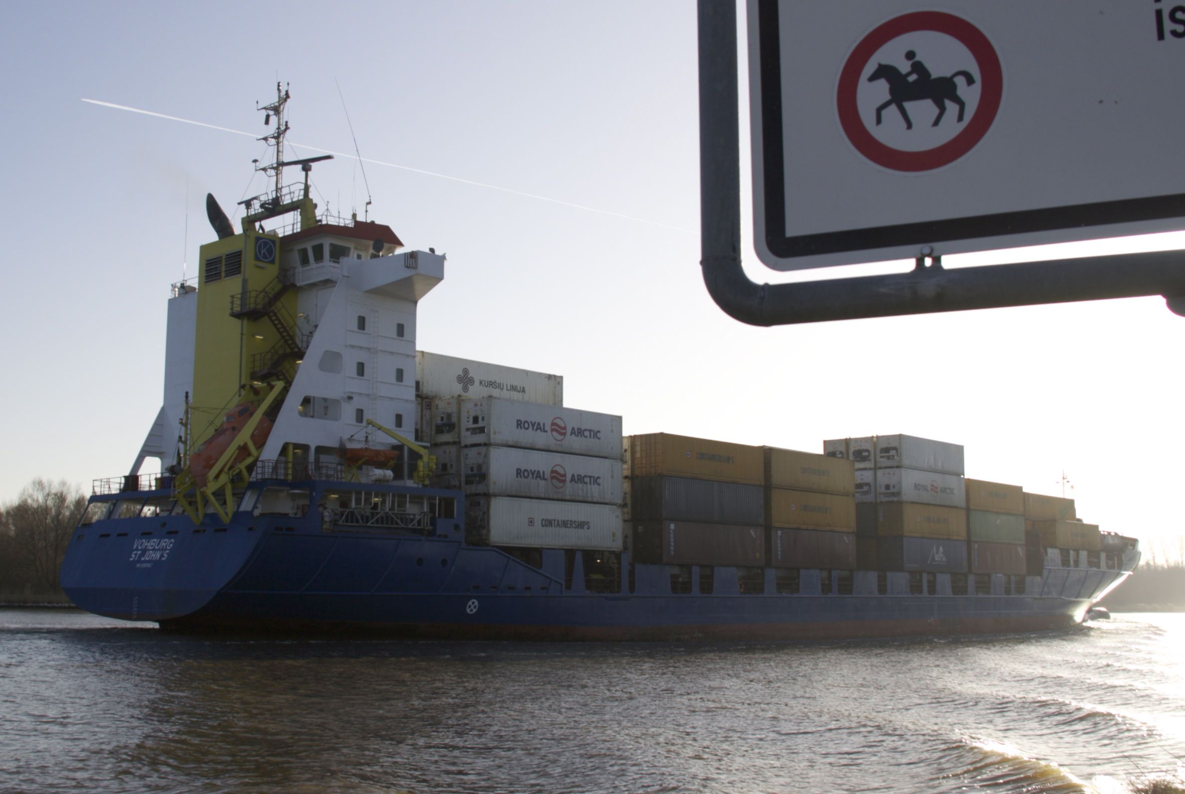 MS Vohburg